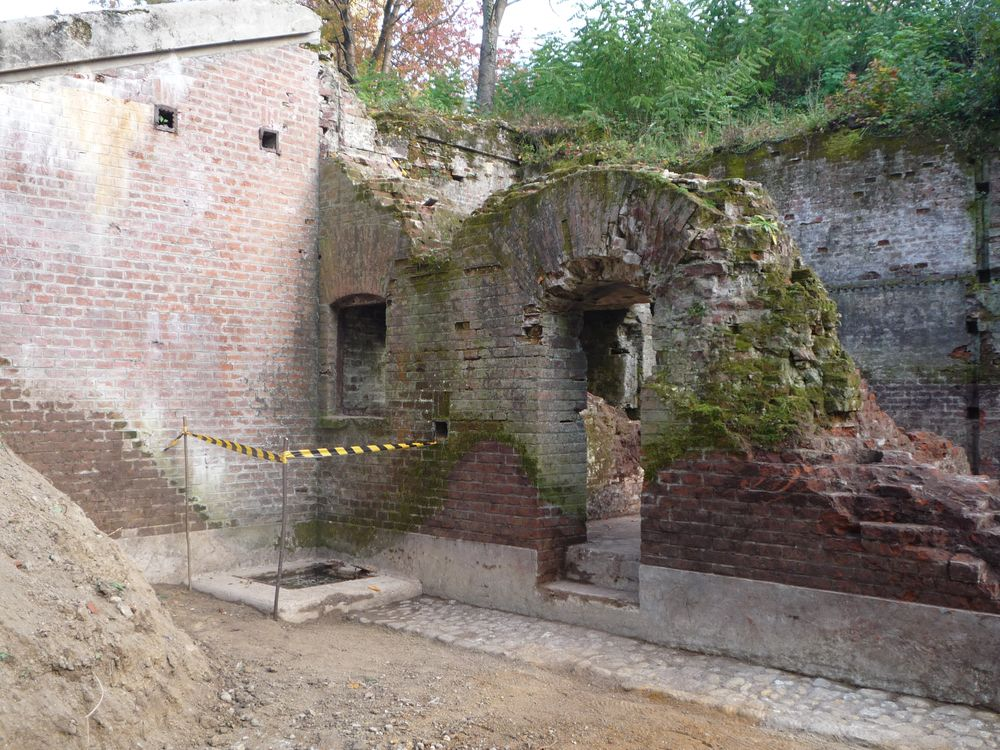 widok na pomieszczenie ubikacji